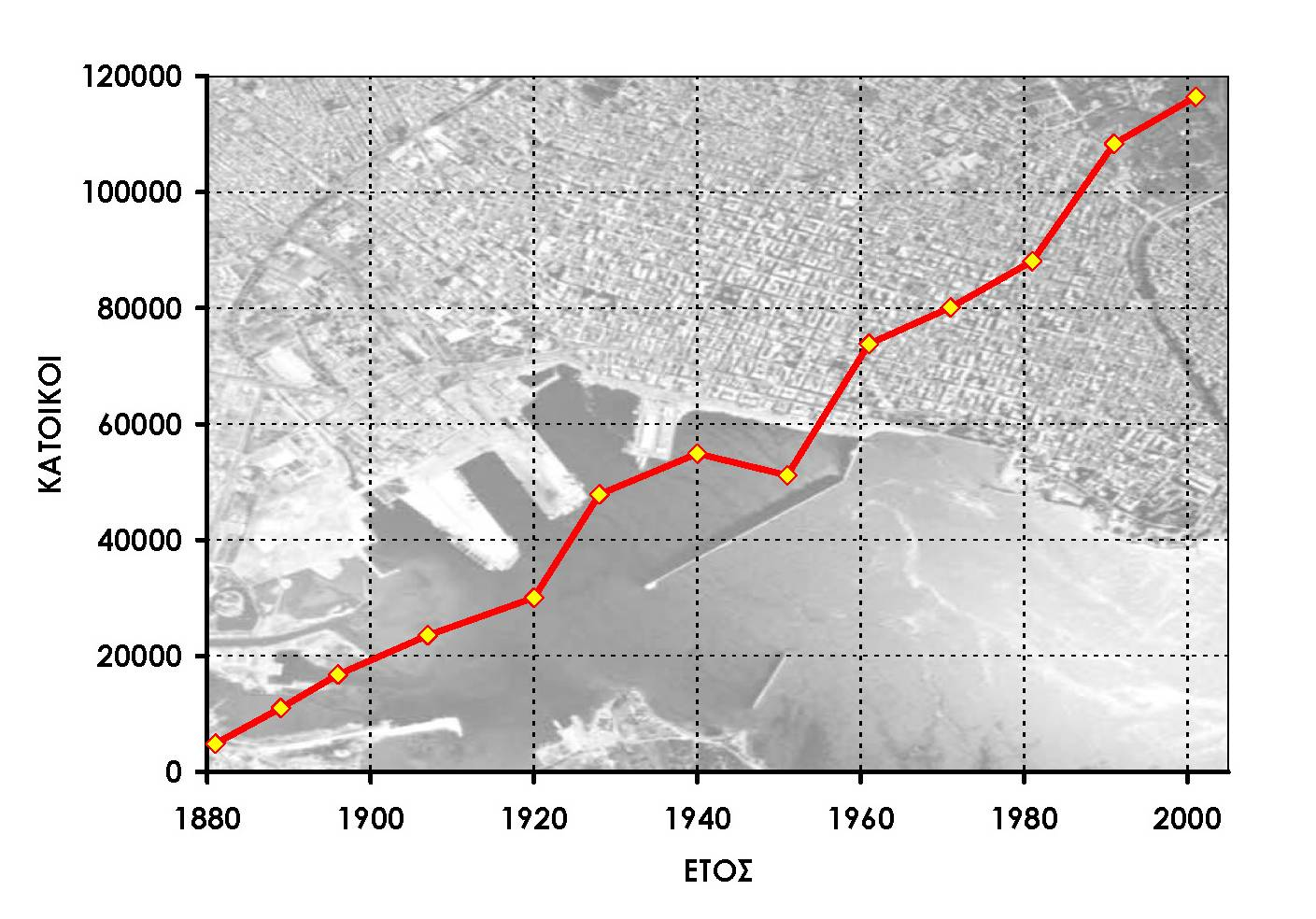 Η αύξηση του πληθυσμού του Βόλου από το 1881 έως το 2001. Στοιχεία από την Εθνική Στατιστική Υπηρεσία της Ελλάδας και από εργασία των μαθητών του 14ου Δημοτικού Σχολείου Βόλου [1]. Η εικόνα του υπόβαθρου του διαγράμματος είναι από αεροφωτογραφία της Γεωγραφικής Υπηρεσίας Στρατού (περί το 1961). Η φωτογραφία είναι κάπως παραποιημένη, αλλά δείχνει την «ορθογώνια» ρημοτομία της νέας πόλης.